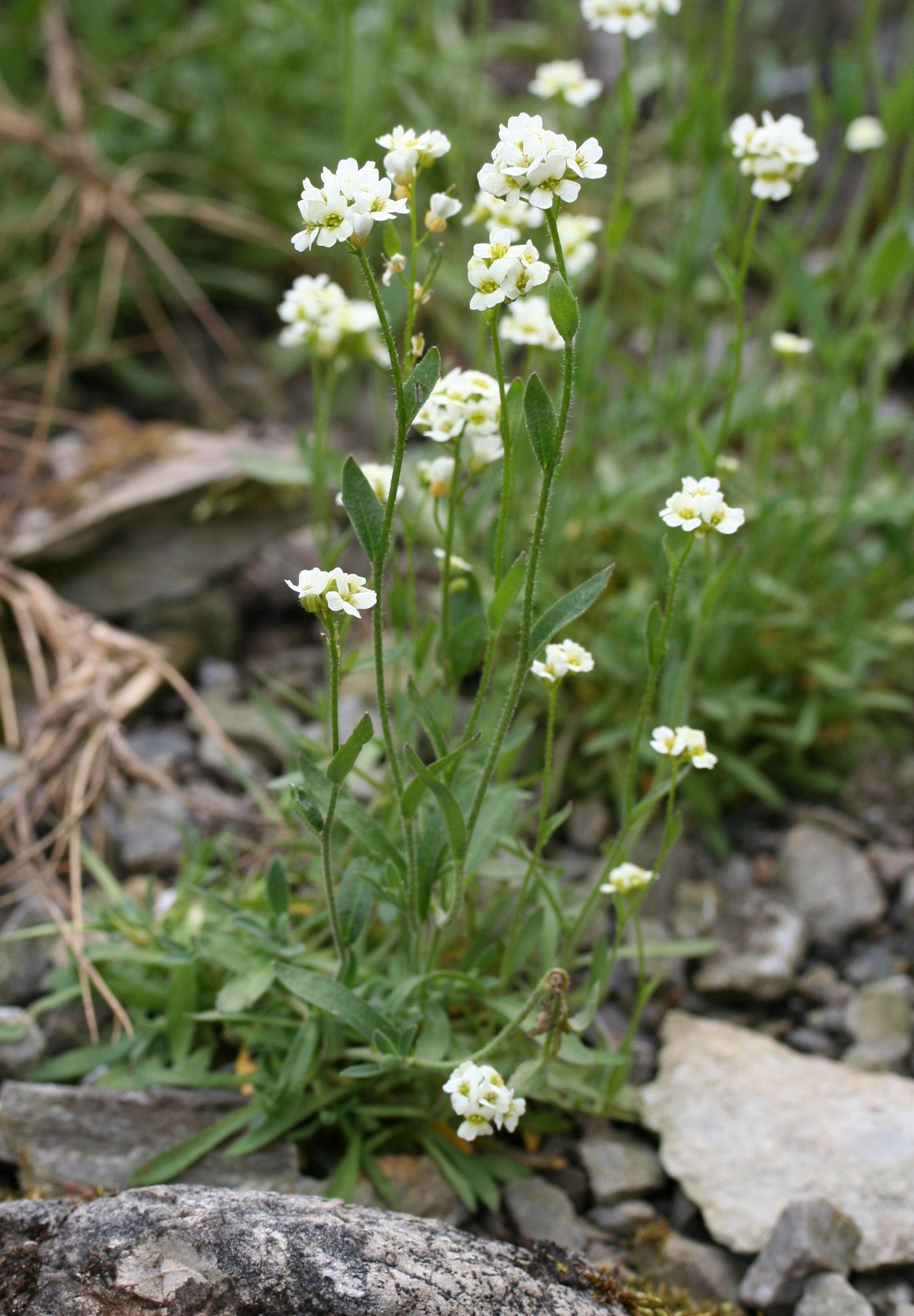 Draba siliquosa im Botanischen Garten Dresden